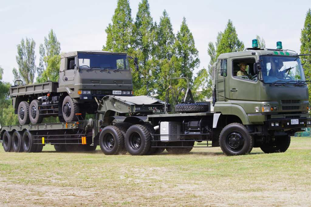 73式セミトレ